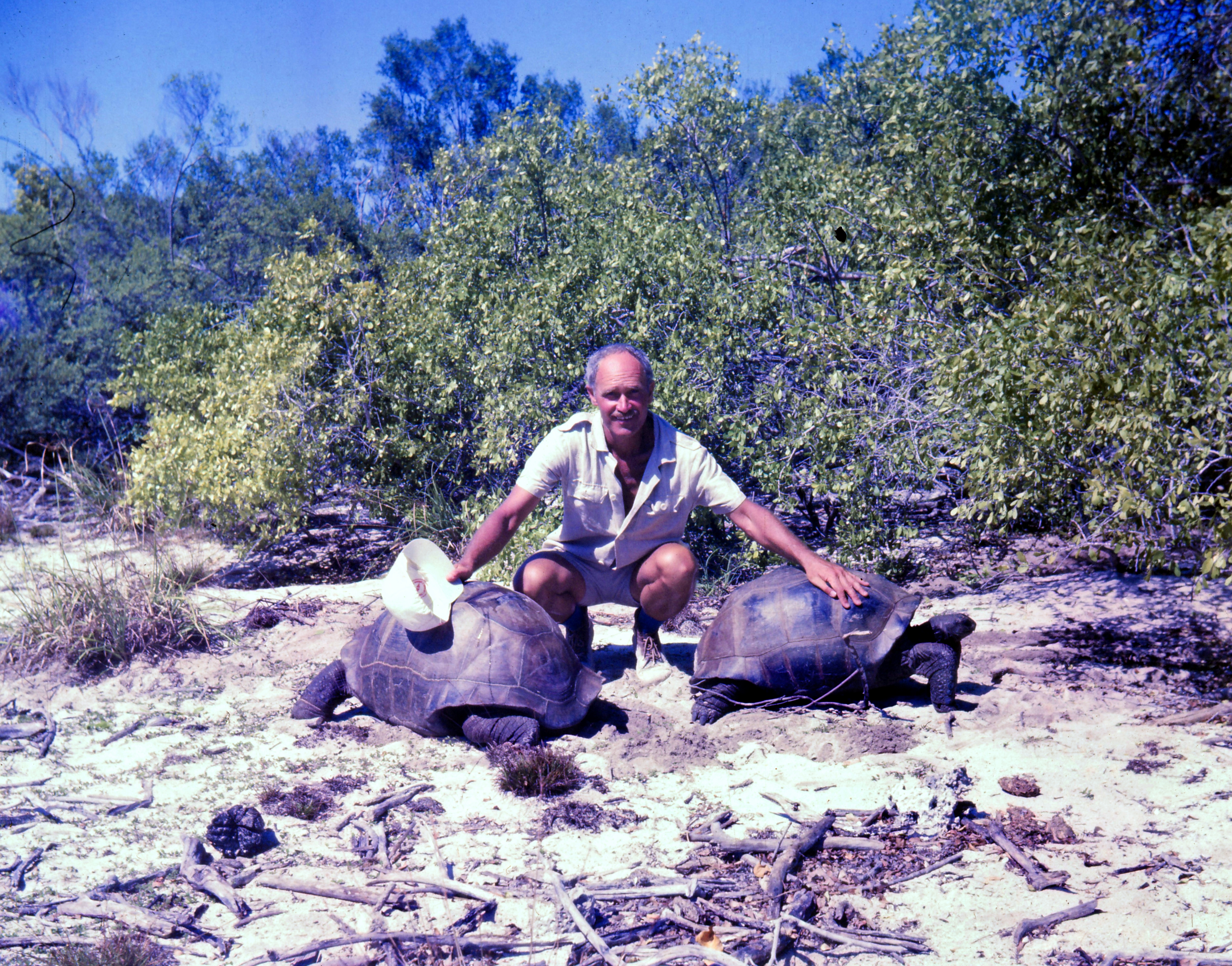 На о. Альдабра под охраной ЮНЕСКО находится колония сухопутных гигантских черепах. Общее число особей - более 100 тысяч.